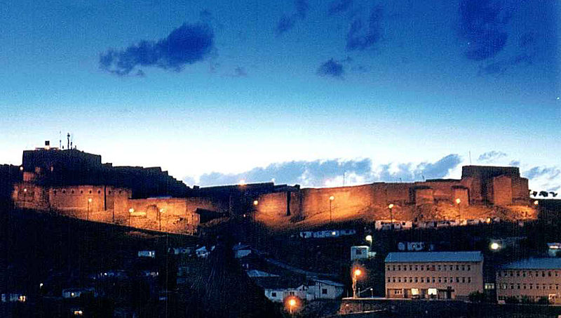 Günbatımında Kars Kalesi.